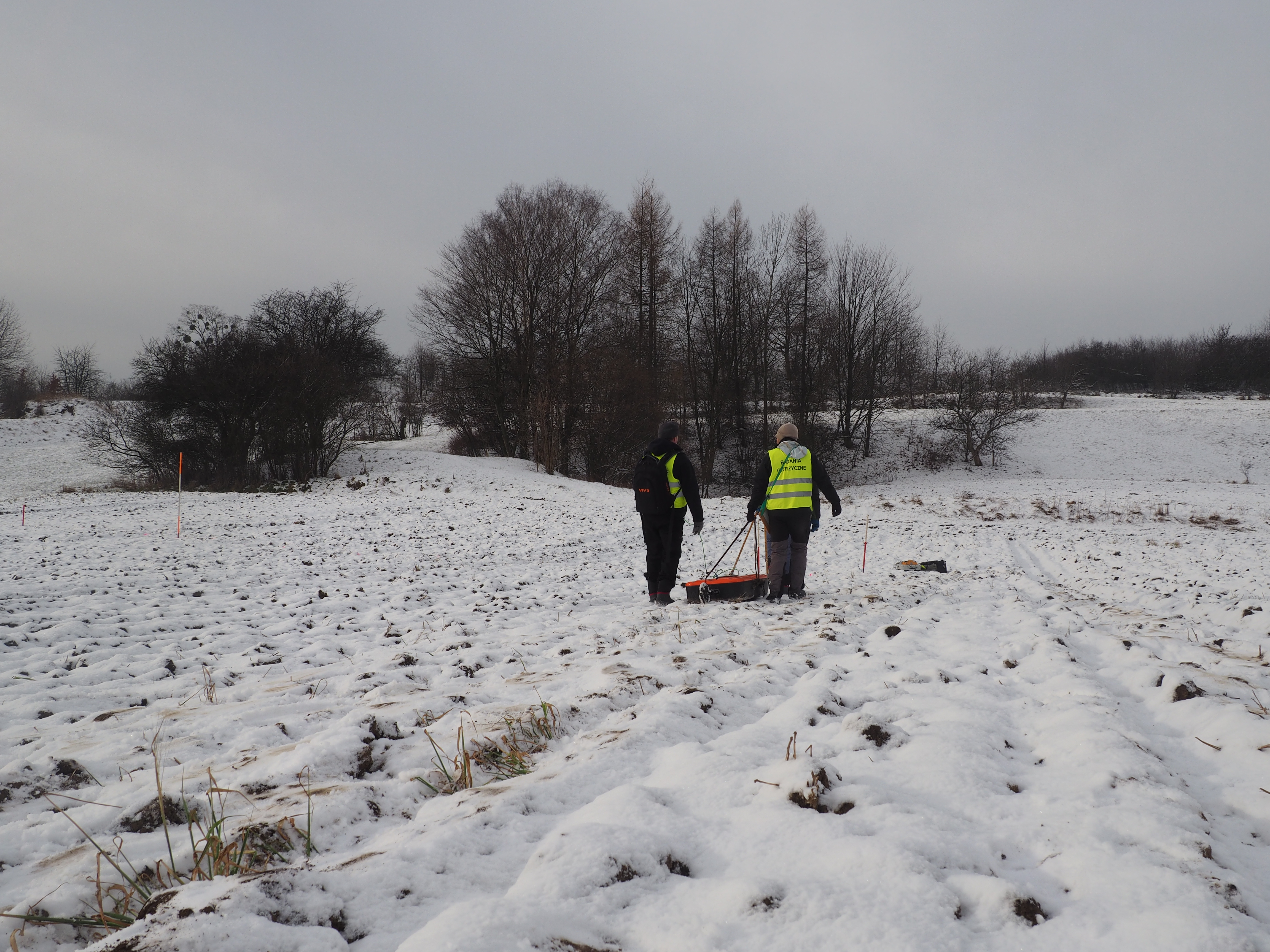 Badania z użyciem georadaru przeprowadzone przez Stowarzyszenie Miłośników Ziemi Tarnogórskiej